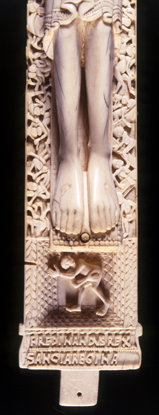 Crucifijo de don Fernando y doña Sancha (Románico). Número de inventario: 52340.